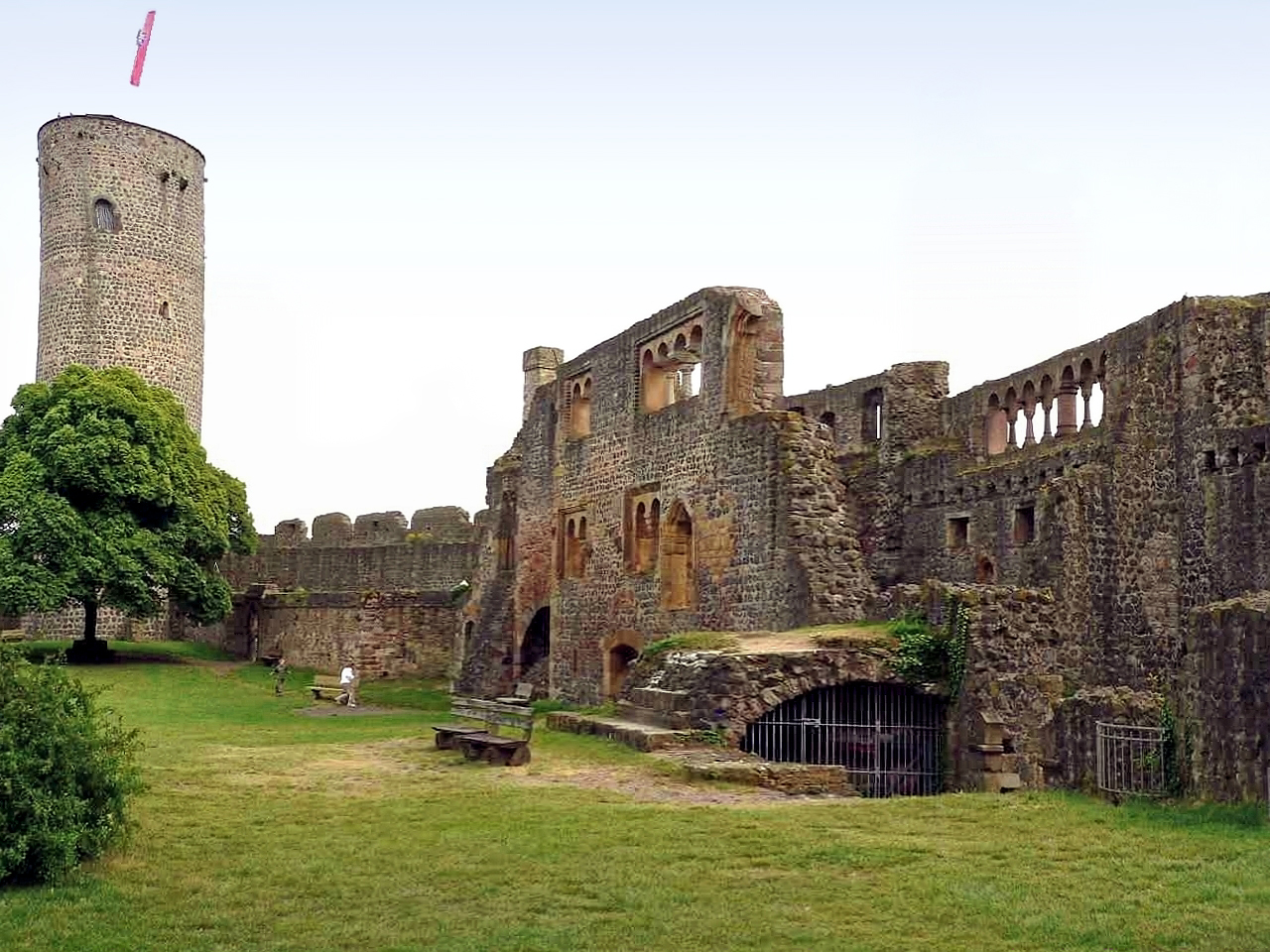 Burgruine Münzenberg - romanischer Palas, Hessen, Deutschland